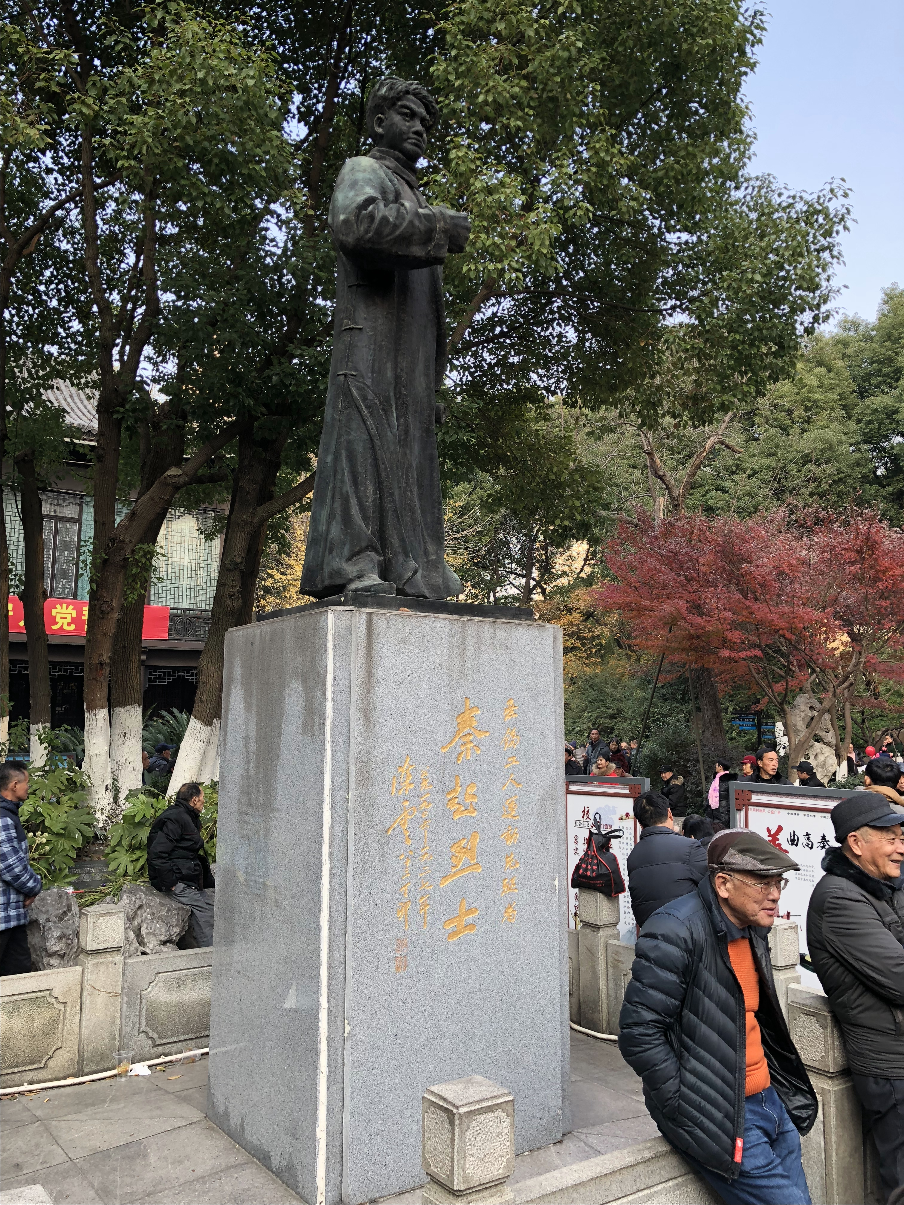 中文（中国大陆）: 无锡 秦起铜像